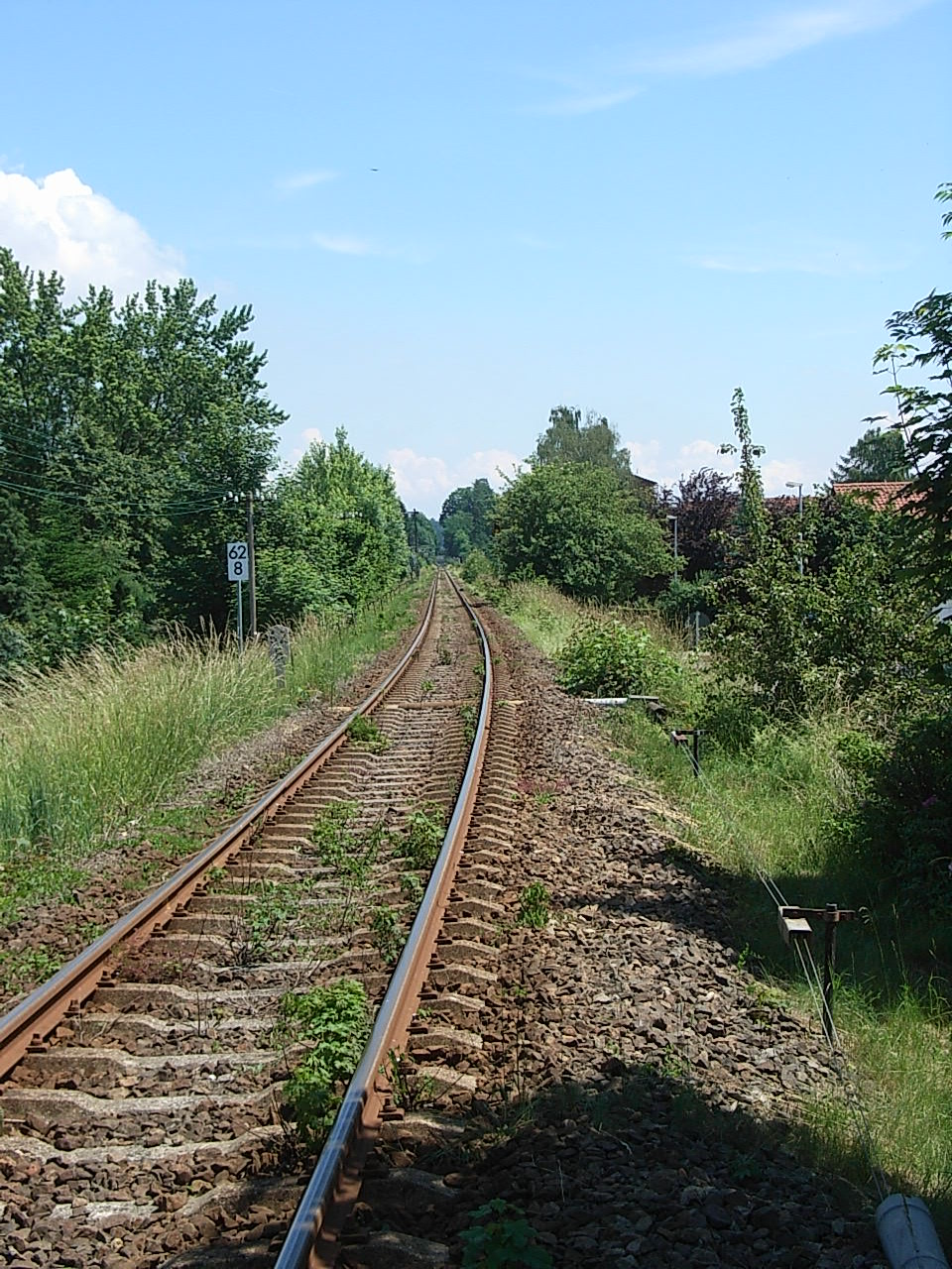 Die Rottalbahn bei Pfarrkirchen Richtung Anzenkirchen